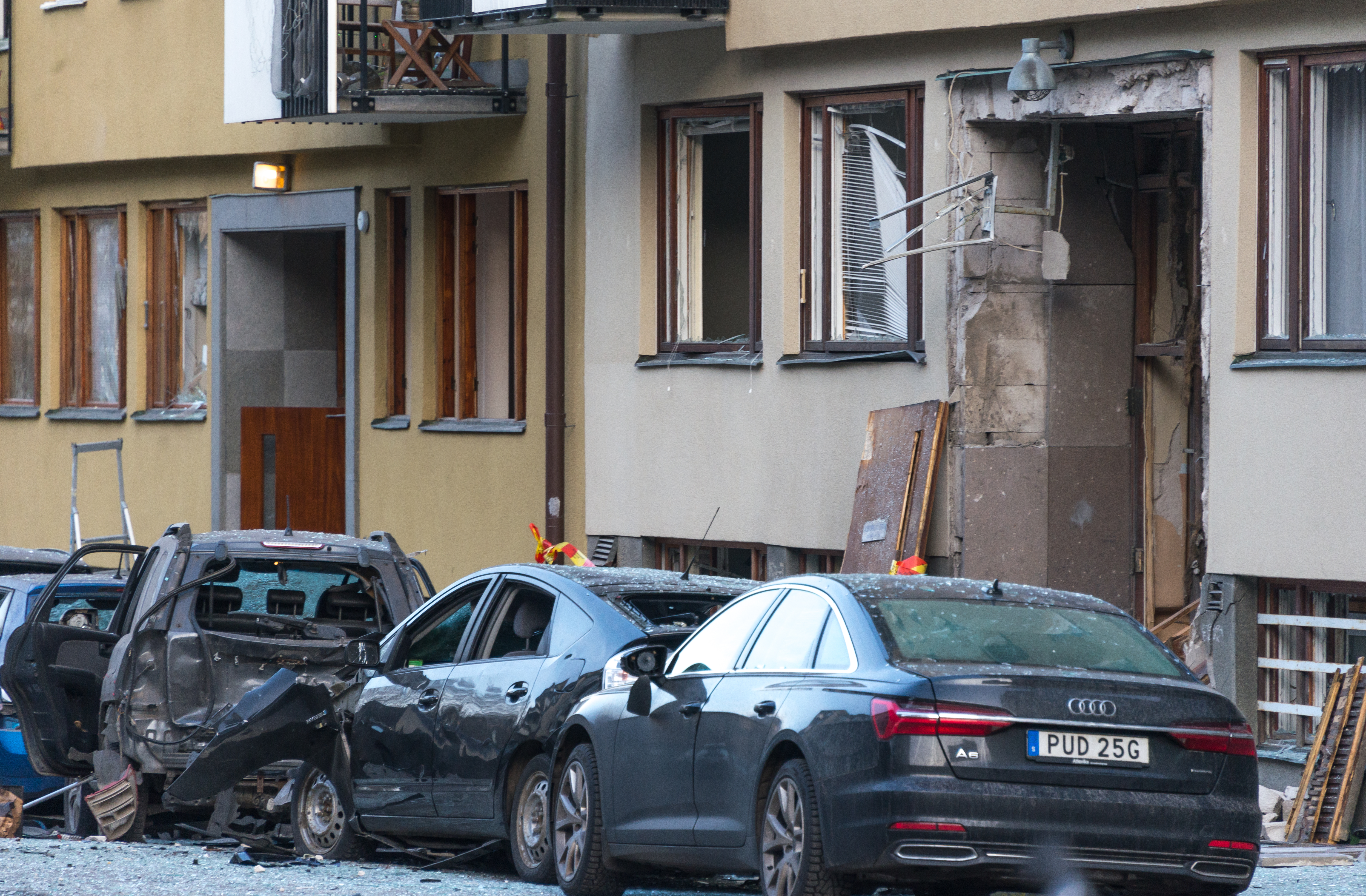 Den 13 januari 2020, på natten, detonerade Stockholms kraftigaste bomb, på Gyllenstiernsgatan mitt på fashionabla Östermalm. Några dar senare greps en misstänkt med kopplingar till narkotikaförsäljning på Östermalm.